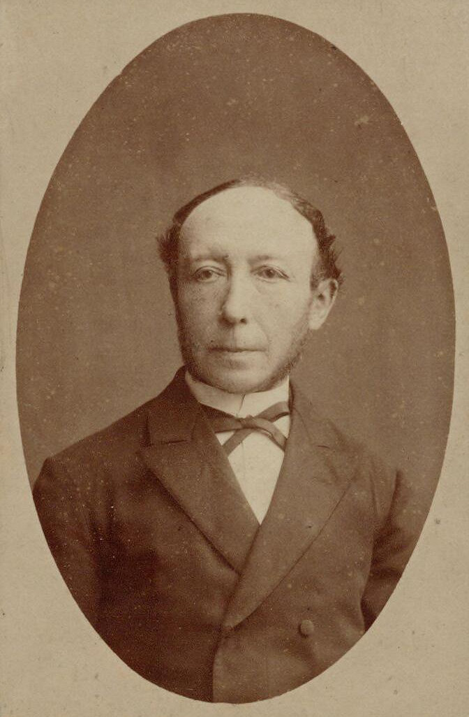 Frederik Hendrik van Persijn (1828-1904), burgemeester van Amersfoort